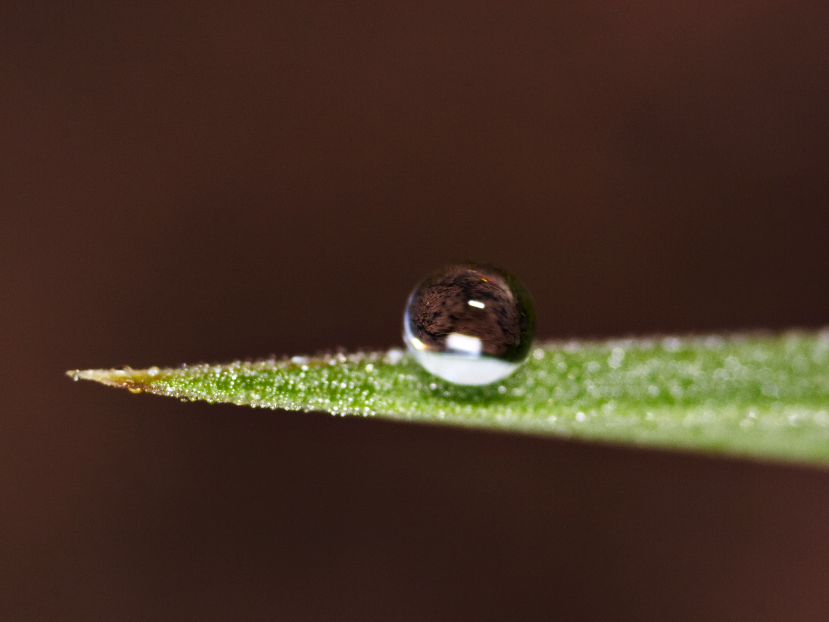 dew droplet, about 1mm in diameter